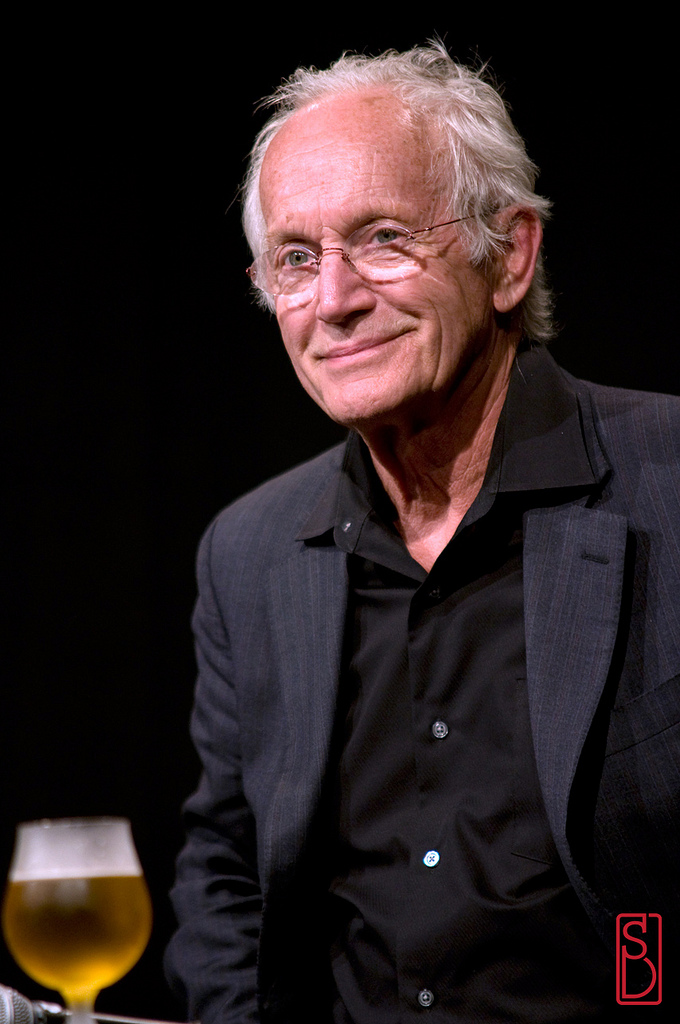 Lance Henriksen. Photo prise lors du BIFFF 2010